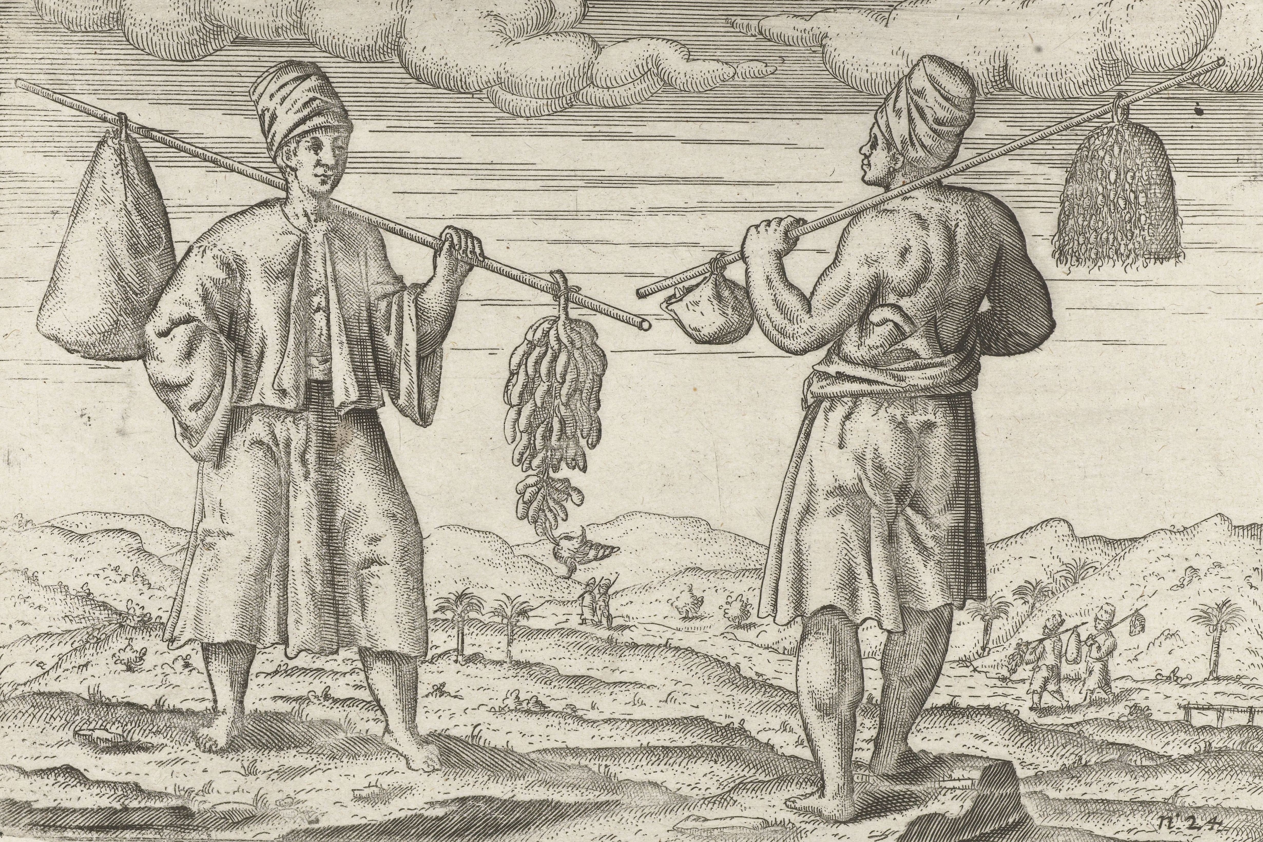 Twee landlieden die achter de stad Bantam (Banten) wonen, 1596. Zij dragen trossen bananen en dadels aan een stok over de schouder. Afdrukken van de opgewerkte platen voor de oorspronkelijke illustraties in het reisverslag van de Eerste Schipvaert van Cornelis de Houtman naar Oost-Indië in 1595-1597. No. 24.